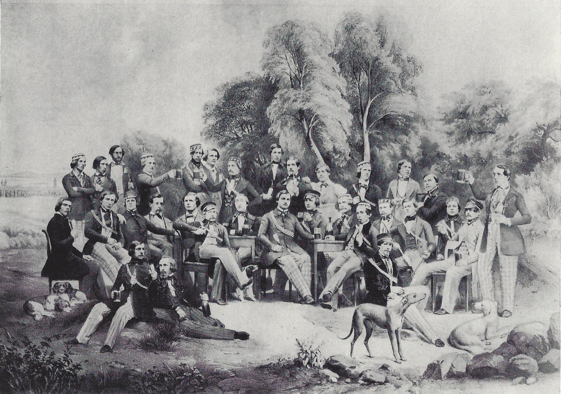 Semesterbild der Hanseatia Göttingen 1846.